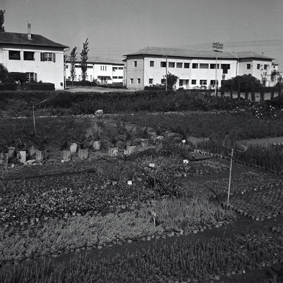 בית הספר החקלאי לצעירות בנהלל